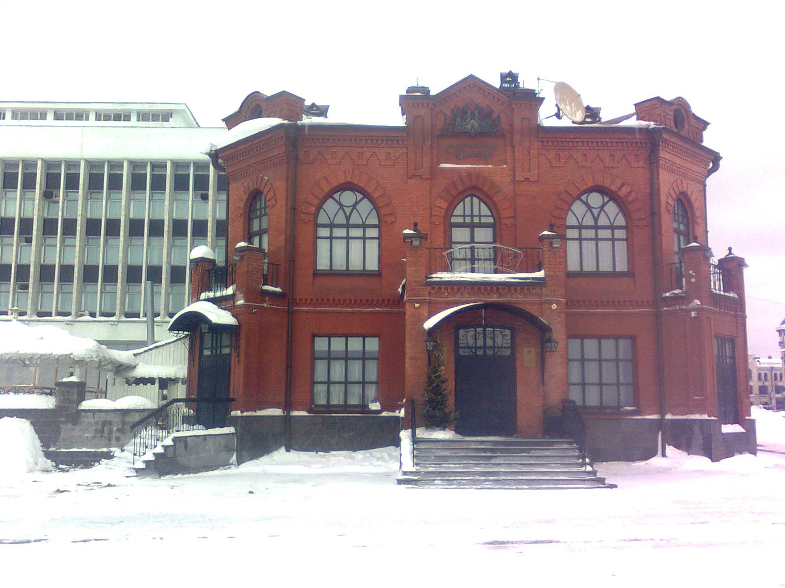 Здание Славянского базара в Томске.